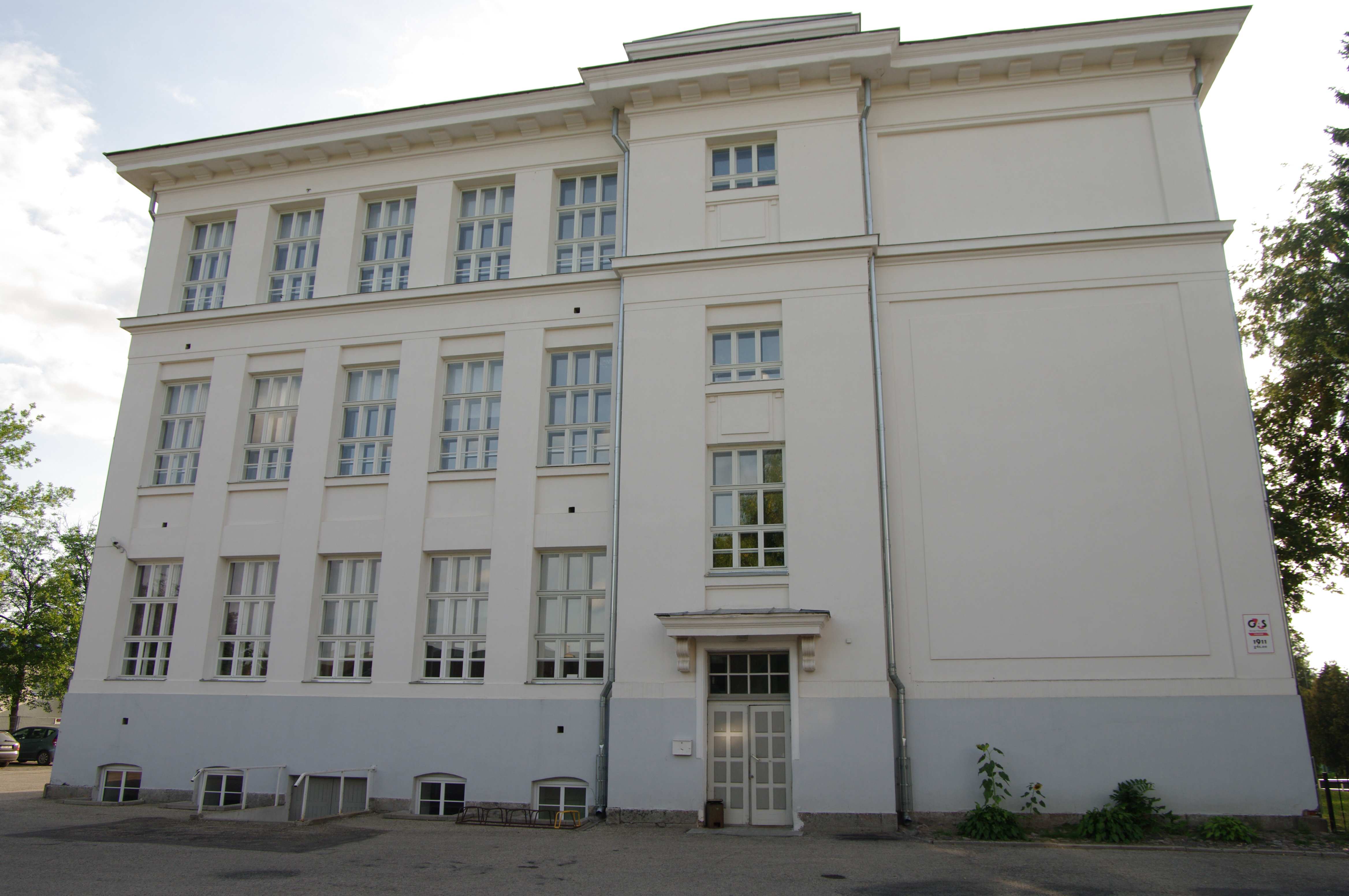 Ehitatud 1915 Reaalkooli hooneks,arh. A.Kieselbasch. I MS-I tõttu kasutati sõjaväehaiglana. Sõja järel 1923 läks Poeglaste Gümnaasiumi käsutusse. Praegu kasutab hoonet Valga 2. Põhikool